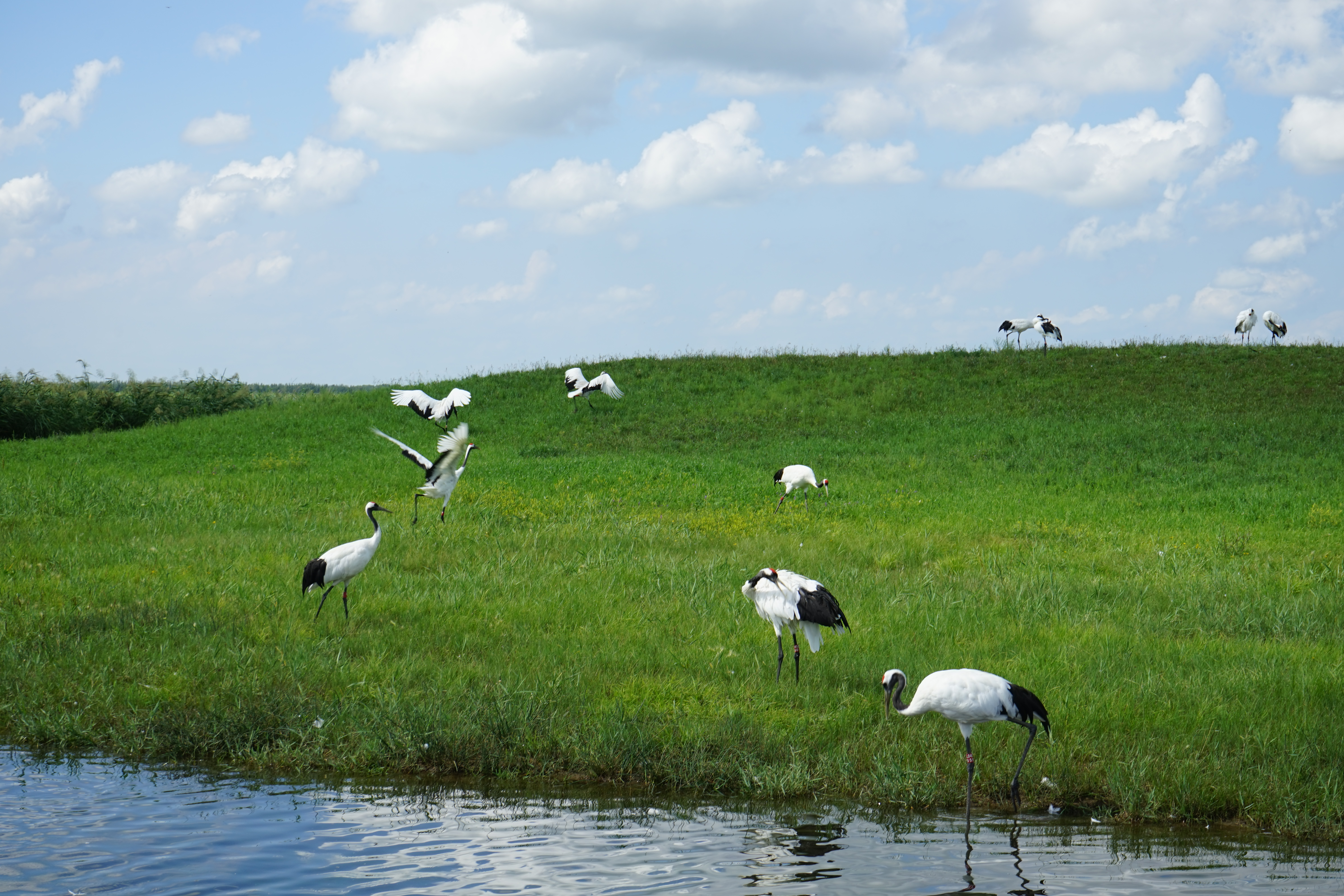 中文（中国大陆）: 丹顶鹤1-扎龙2017